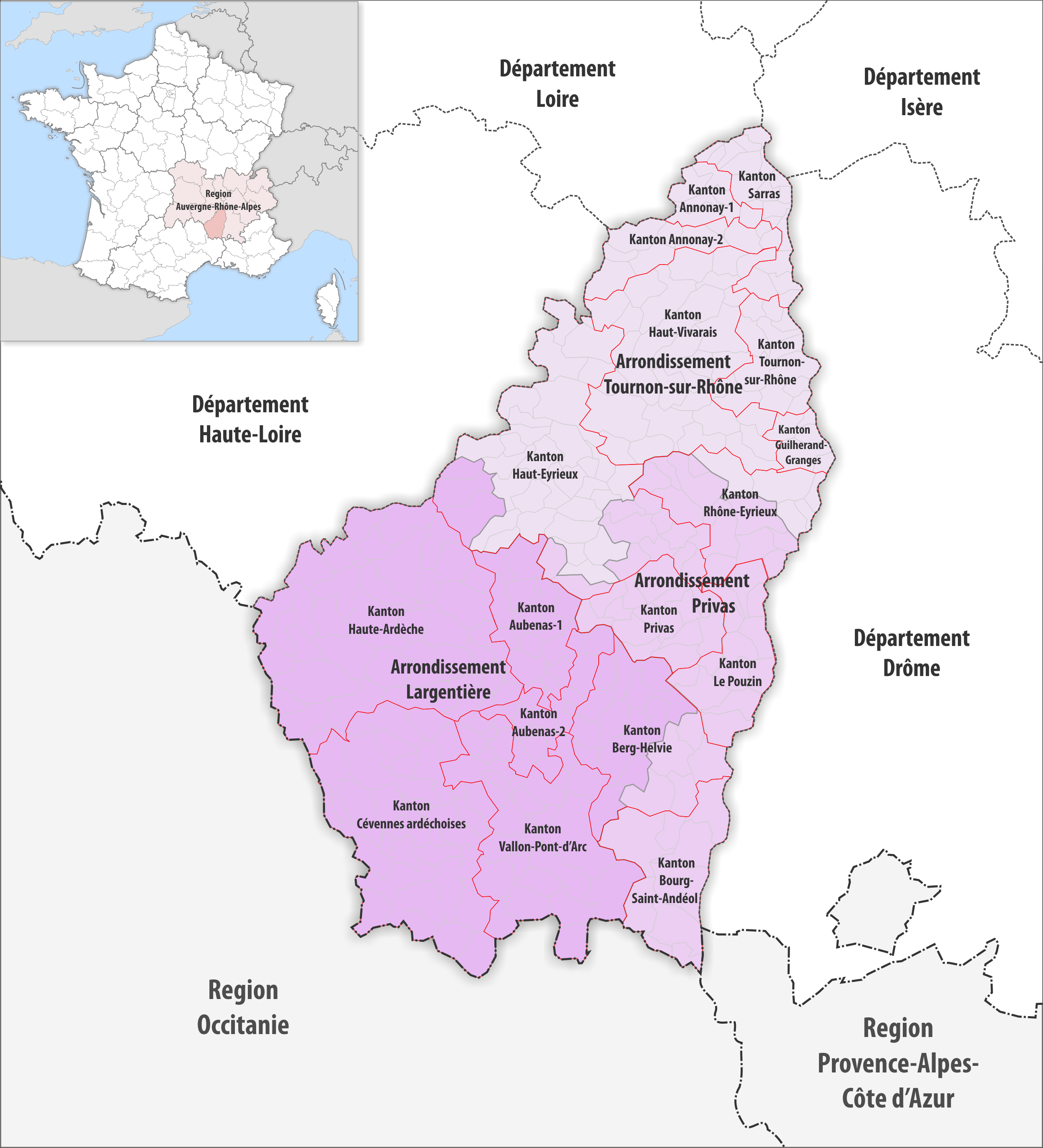 Gemeinden, Kantone und Arrondissemente im Departement Ardèche